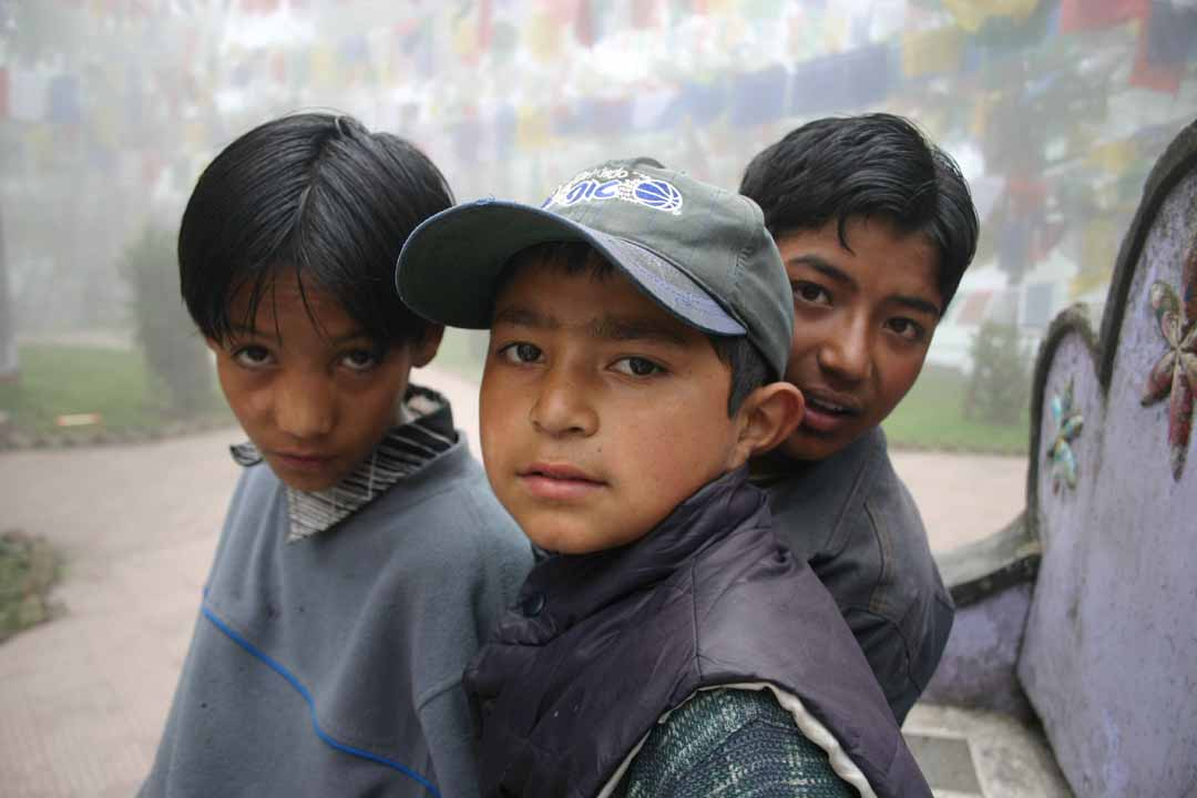 Three boys in Darjeeling.